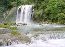 Saut-Mathurine de Camp-perrin